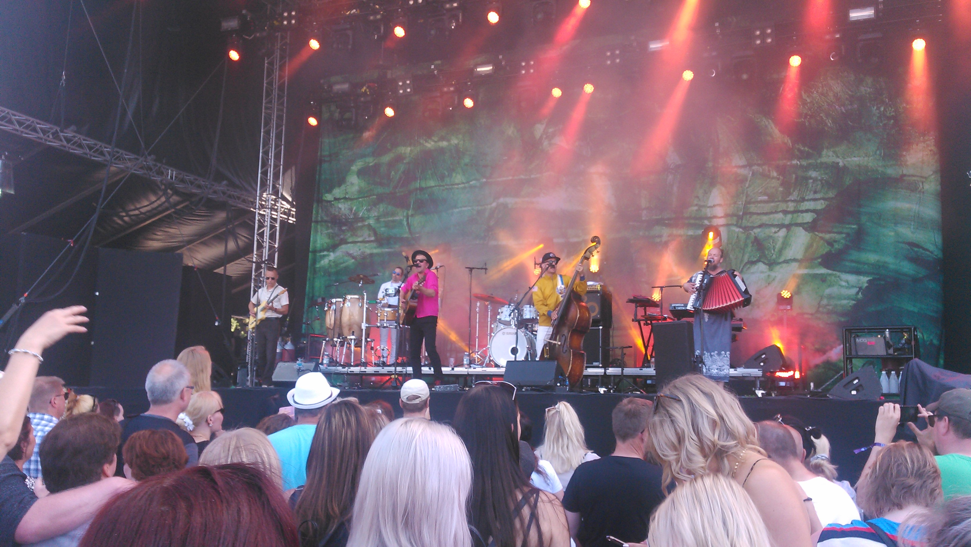 Tuure Kilpeläinen ja Kaihon Karavaani esiintymässä Tammerfestilla lauantaina 20. heinäkuuta 2019